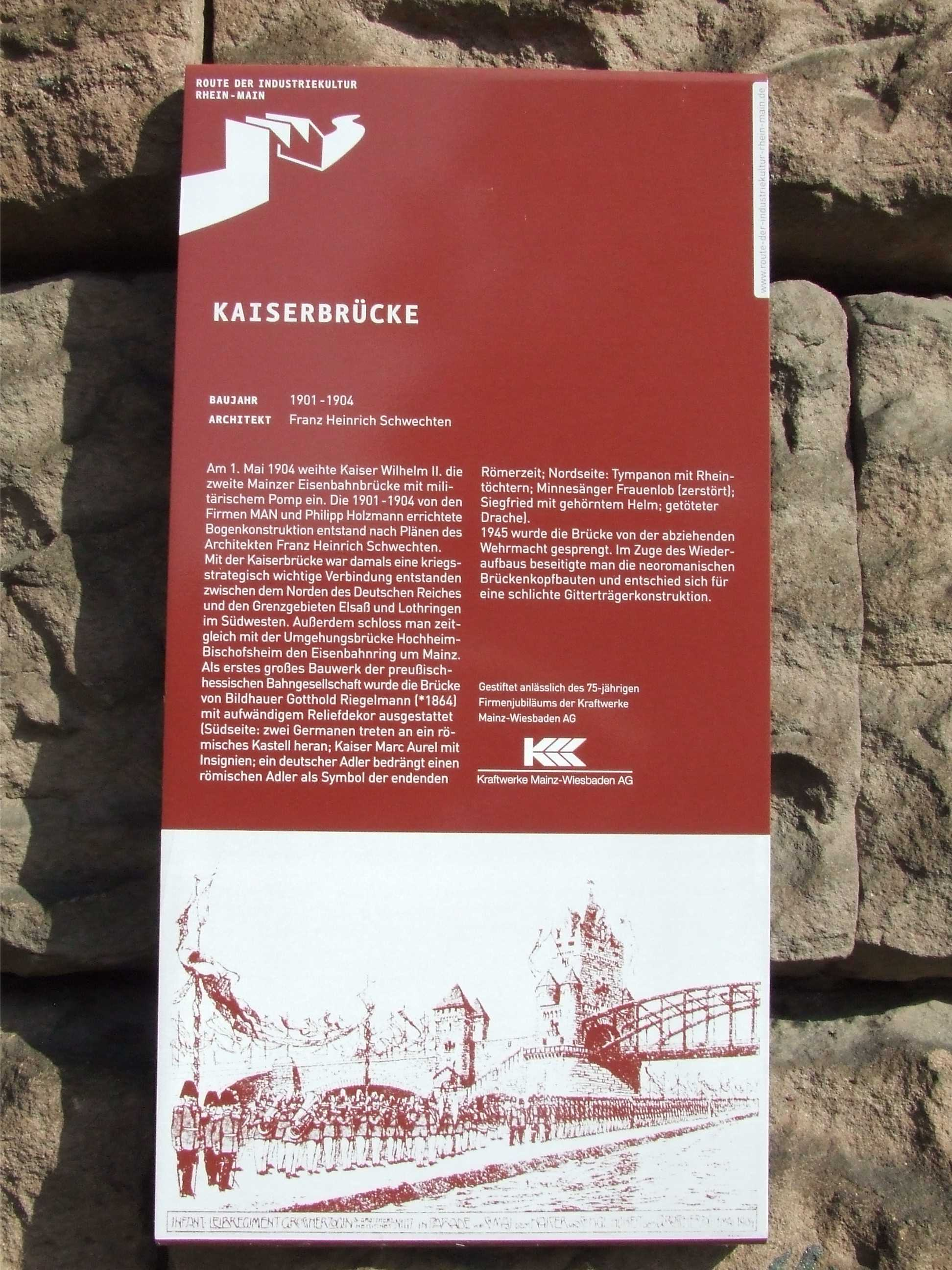 Kaiserbrücke zwischen Mainz und Wiesbaden